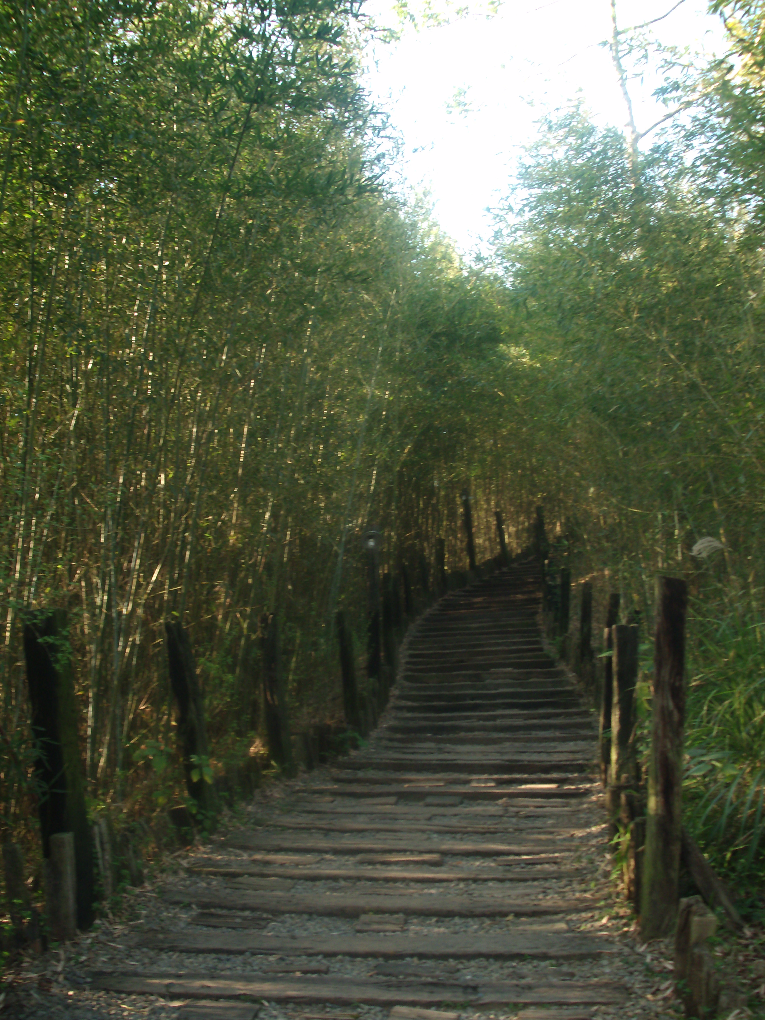 綠世界生態農場的竹林步道。